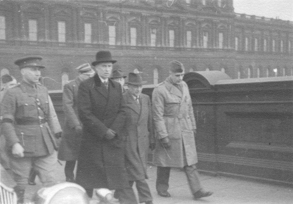 Otwarcie Polskiego Wydziału Lekarskiego na Uniwersytecie Edynburskim. Od prawej: ppłk. prof dr Antoni Jurasz, Stanisław Kot, prezydent RP Władysław Raczkiewicz